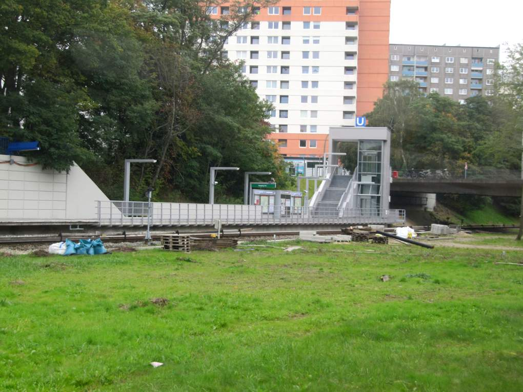 Bauliche Ergänzungen des U-Bahnhofs Legienstraße in Hamburg, Oktober 2015.